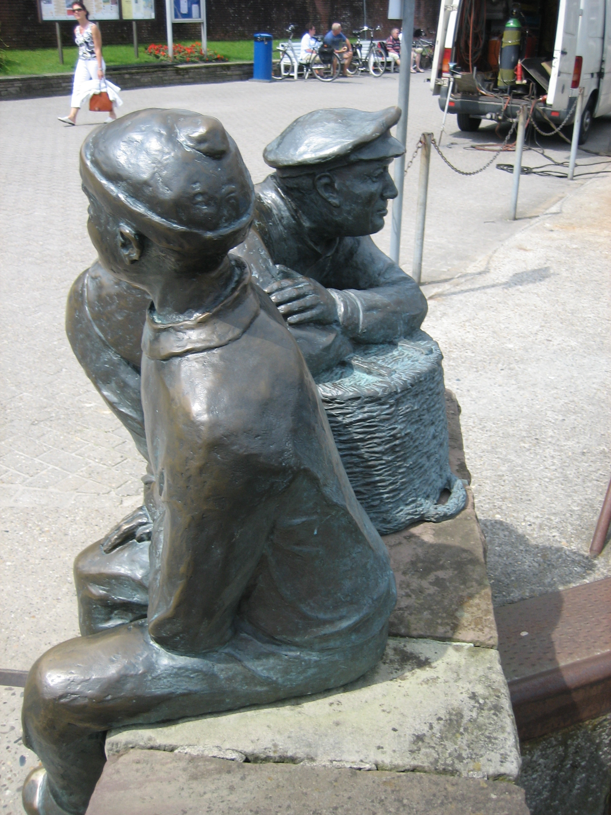 Neuharlingersiel, Ostfriesland: Skulptur "Alt-und Jungfischer". Aufschrift auf der Tafel: ALT- UND JUNGFISCHER: den Fischern von der Gemeinde Neuharlingersiel gewidmet. Mai 2000, Petersen/Petersen, Esens Neuharlingersiel, Germany: Sculpure "Alt-und Jungfischer" (old and young fisherman)